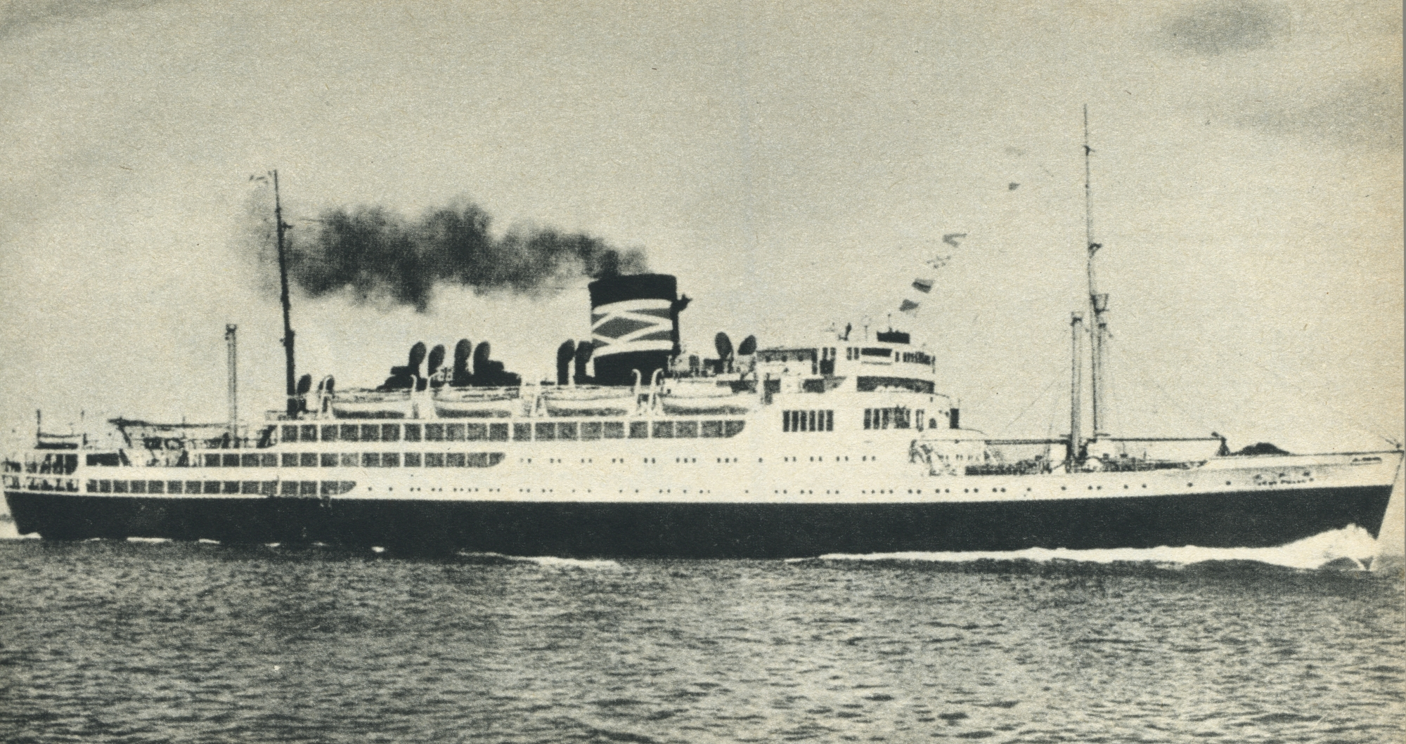 東亜海運の貨客船「神戸丸」。